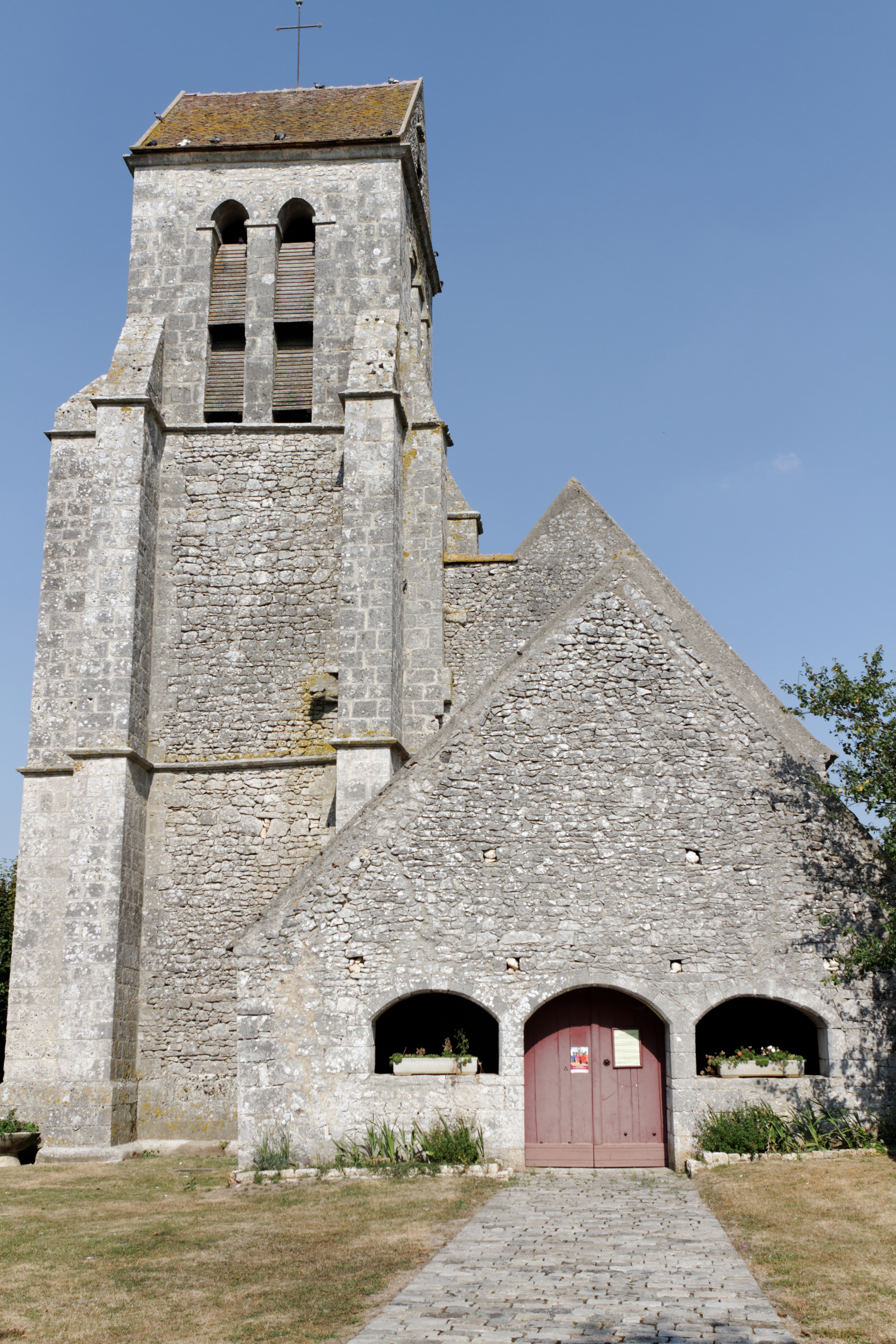 Église Saint-Médard de Remauville, (Inscrit, 1926) .